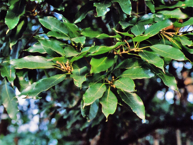 Quercus acuta, hojas de roble de Japon. Foto por usario Inti-sol en Tokyo, enero de 2007. アカガシの葉。2007年1月に投稿者が撮影。